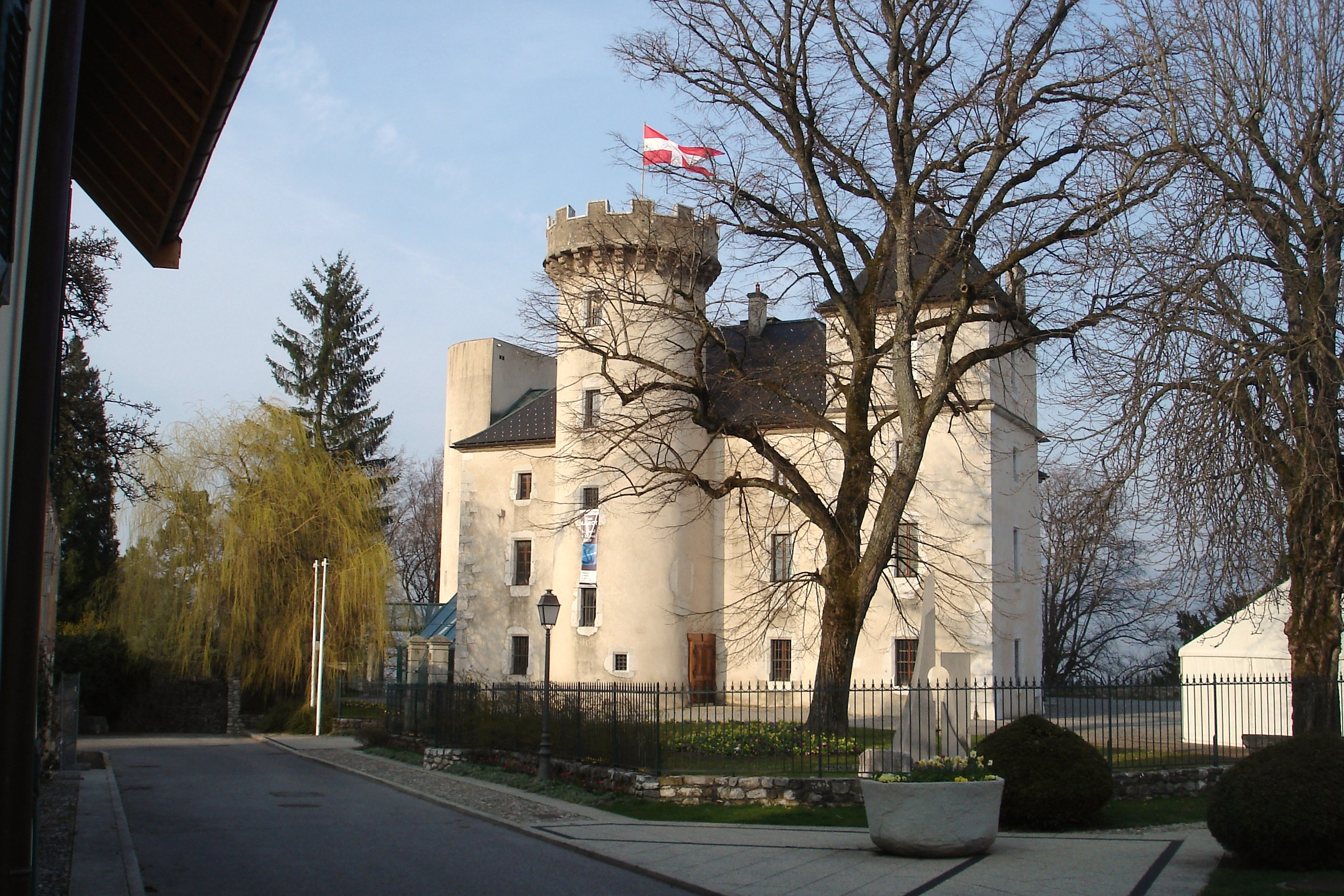 Château de La Roche-sur-Foron en Haute-Savoie - France